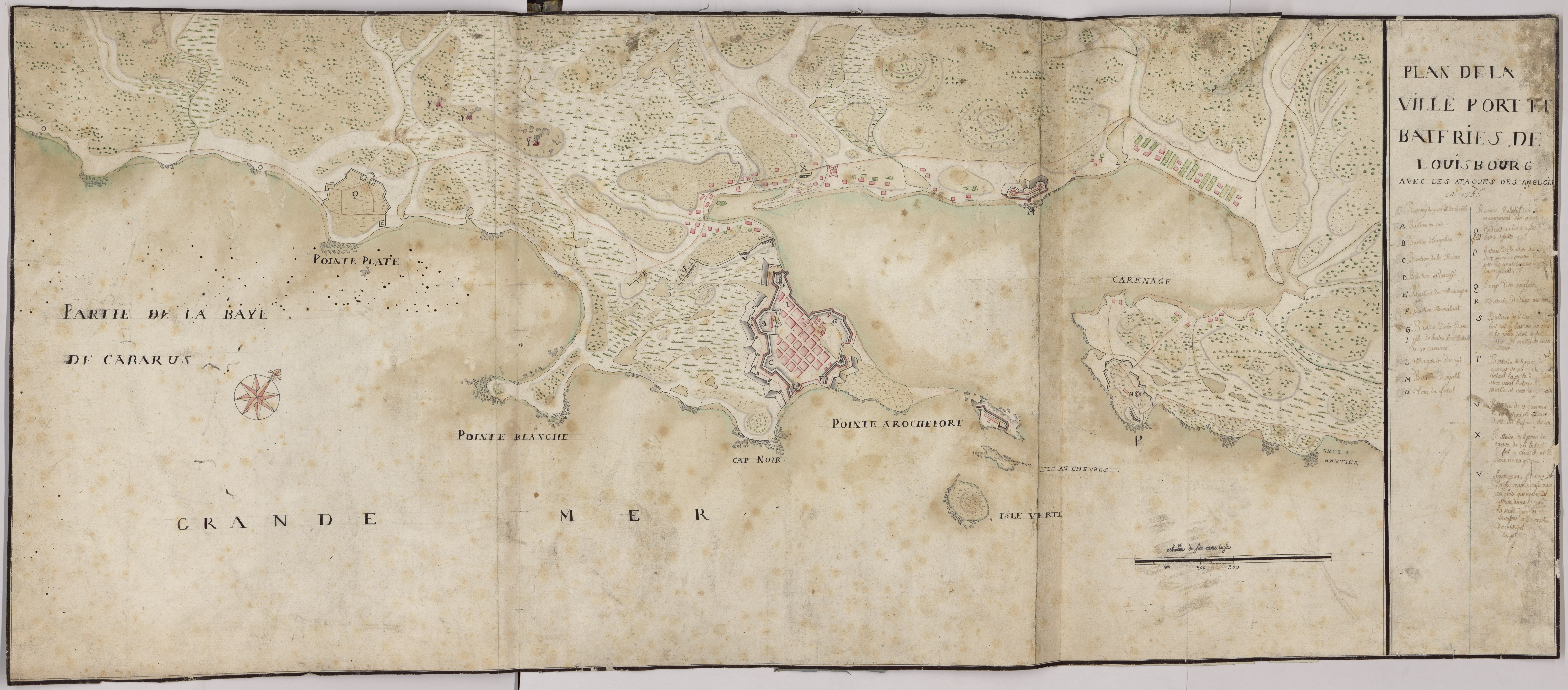 Plan de la ville, port et bateries de Louisbourg avec les ataques des Anglois en 1745. Carte manuscrite à l'aquarelle. Sert d'atlas à la « Relation du siège de Louisbourg au Canada en 1758 » par Morot de Grésigny.